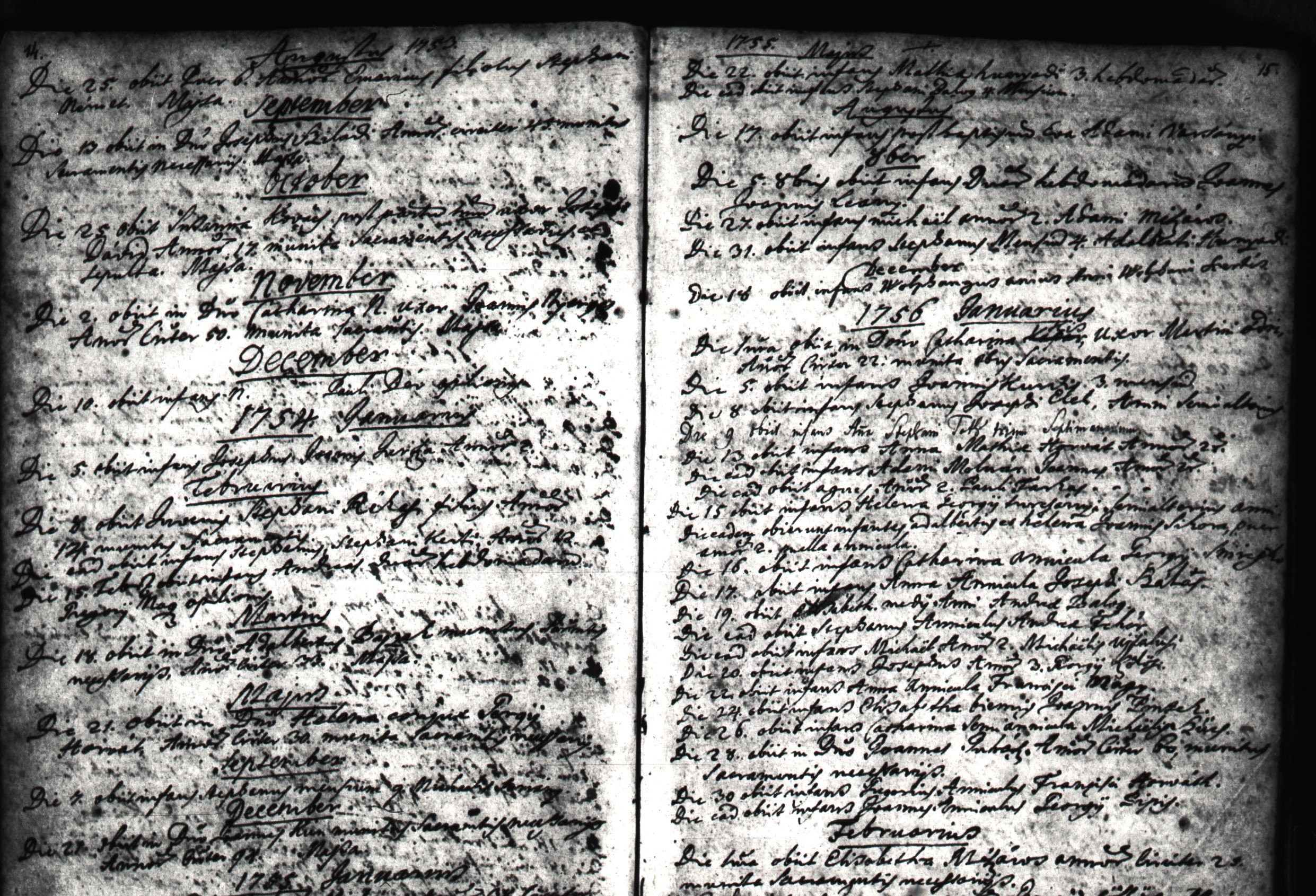 A fénykép a majsai r.k. halotti anyakönyv 12. és 13. oldalának (felső) részlete, mely 1751.augusztus 25. - 1756. febr. elejéig tartó bejegyzéseket tartalmazza.